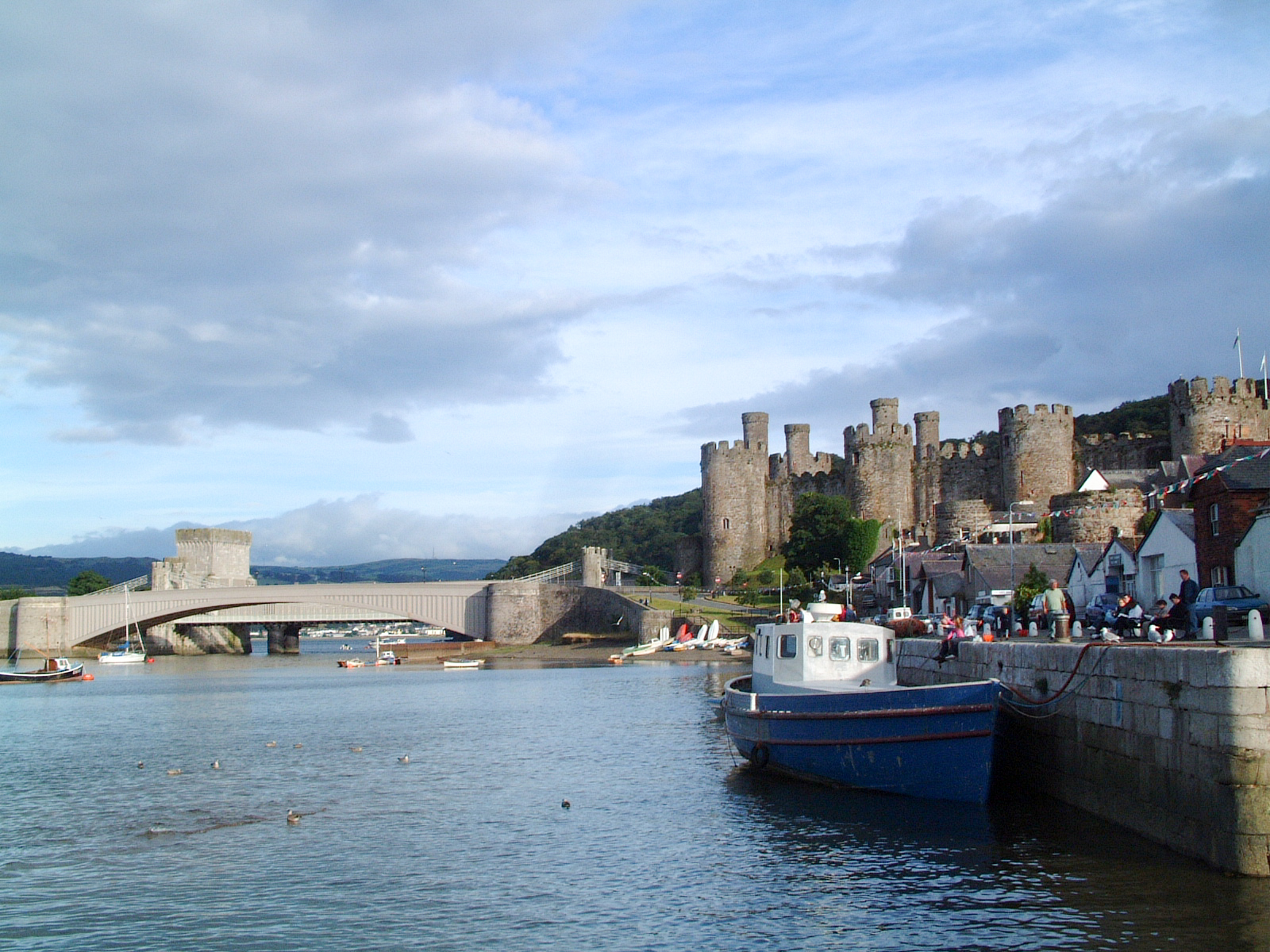 Conwy Castle